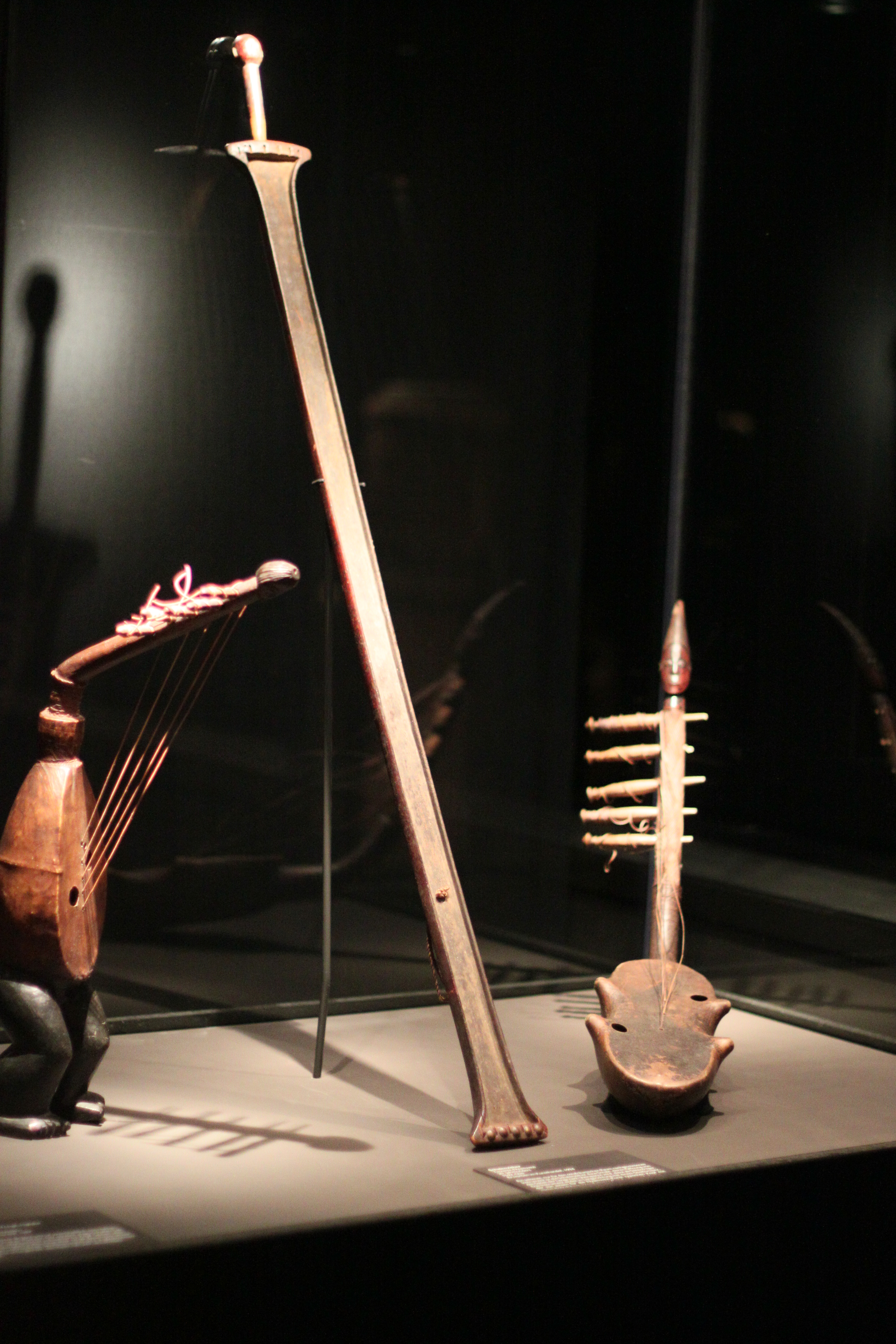 Schalenzither, Tansania, Nyamwezi; Holz, Glas; 20. Jh.; Afrikaabteilung im Ethnologischen Museum, Berlin, Inv. nr. III E 20115; erworben im Kunsthandel 1994